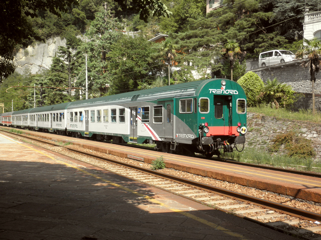 Stazione ferroviaria di Varenna-Esino-Perledo. È in sosta un treno RegioExpress da Milano Centrale per Tirano.